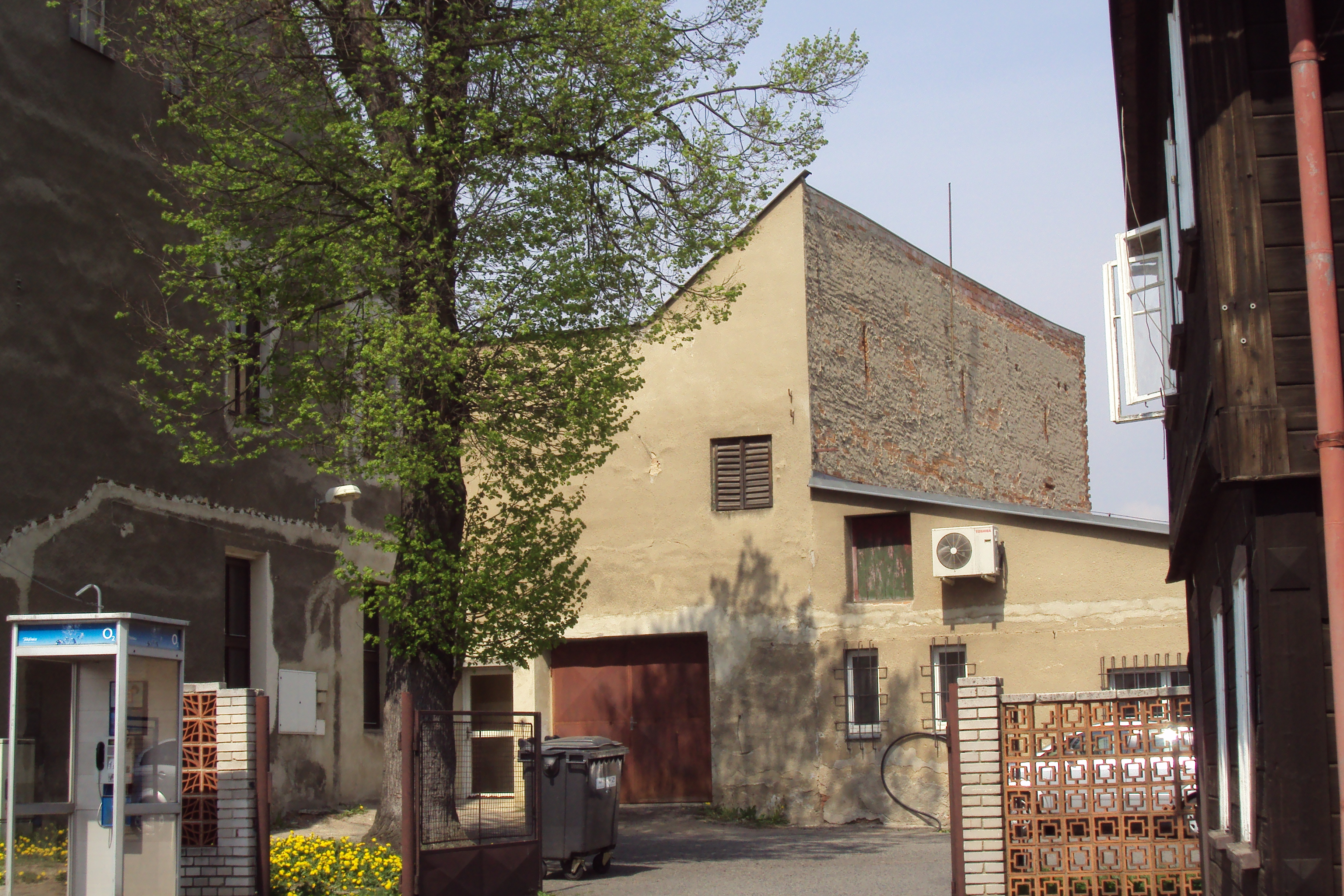 Přístavek k budově radnice Zákupy, kdysi hasiči, dnes stavební úřad města